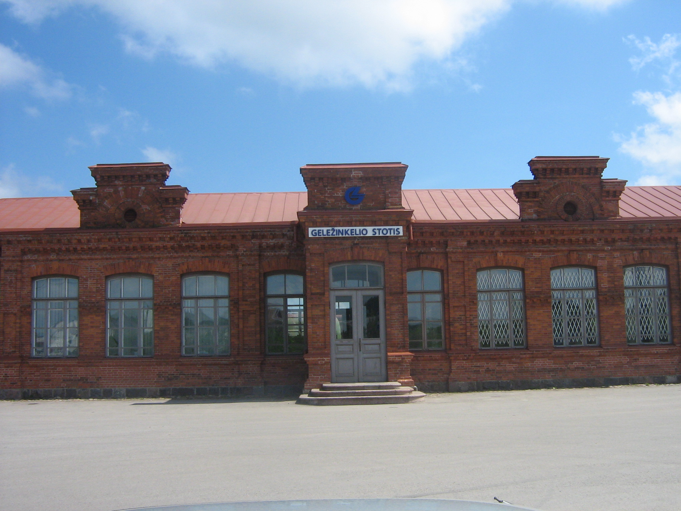 Jonavos traukinių stotis